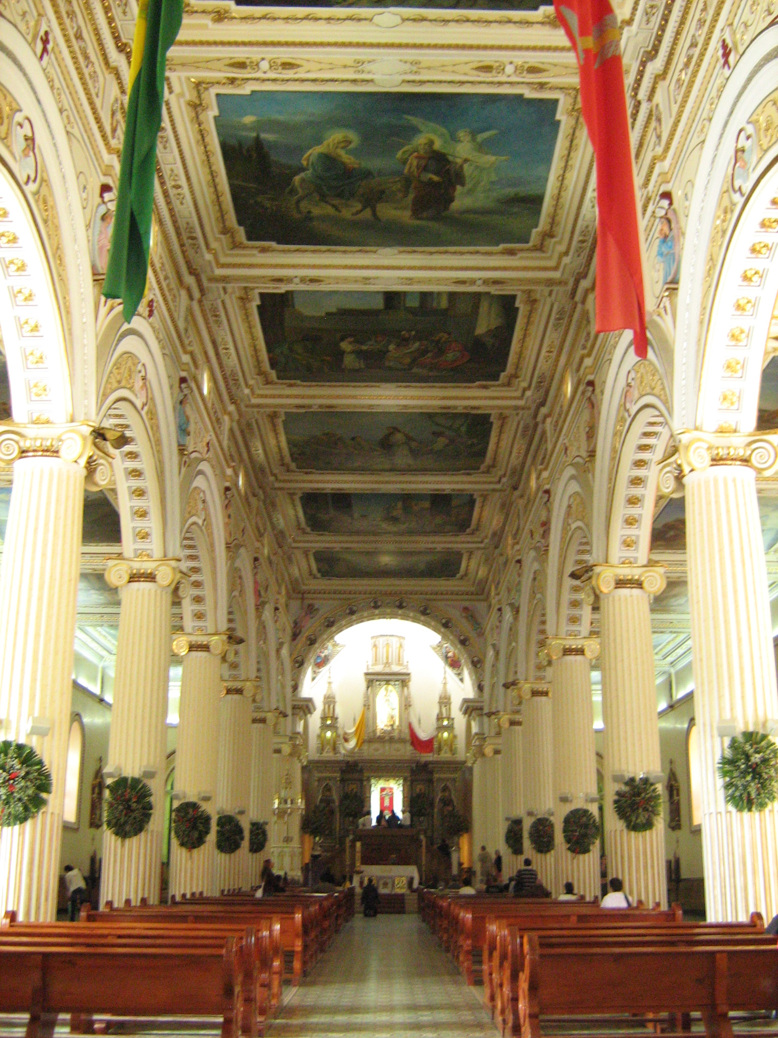 Basílica Menor del Señor de los Milagros del municipio de San Pedro de los Milagros, Antioquia. Colombia.